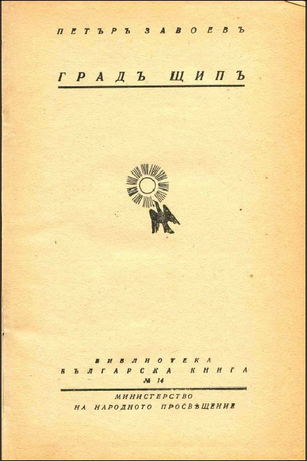 Корица на книгата на роденият в Щип писател Петър Завоев "Град Щип"